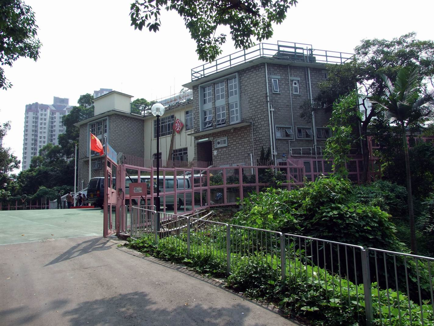 大埔國民教育中心